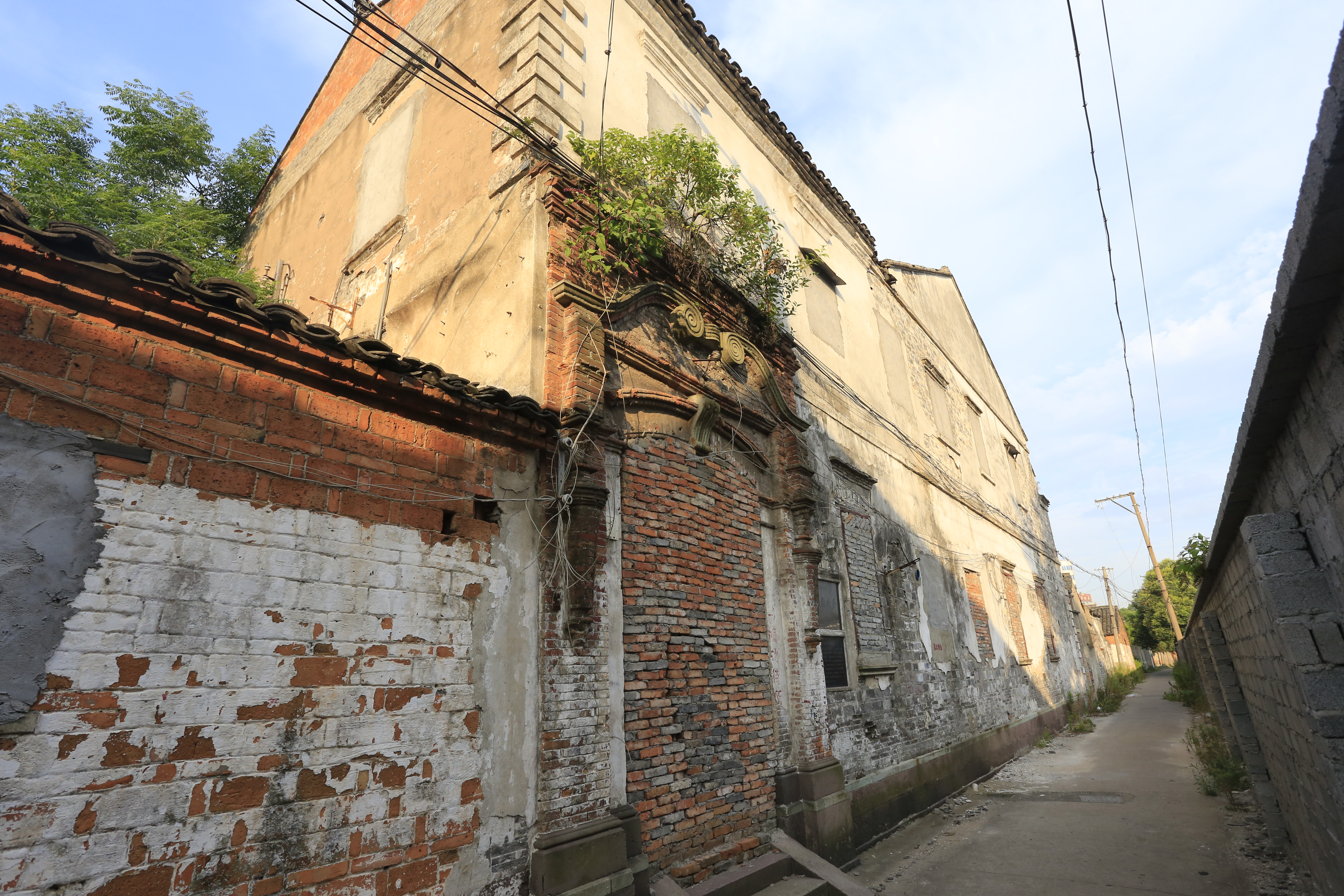 宁波翁文灏故居